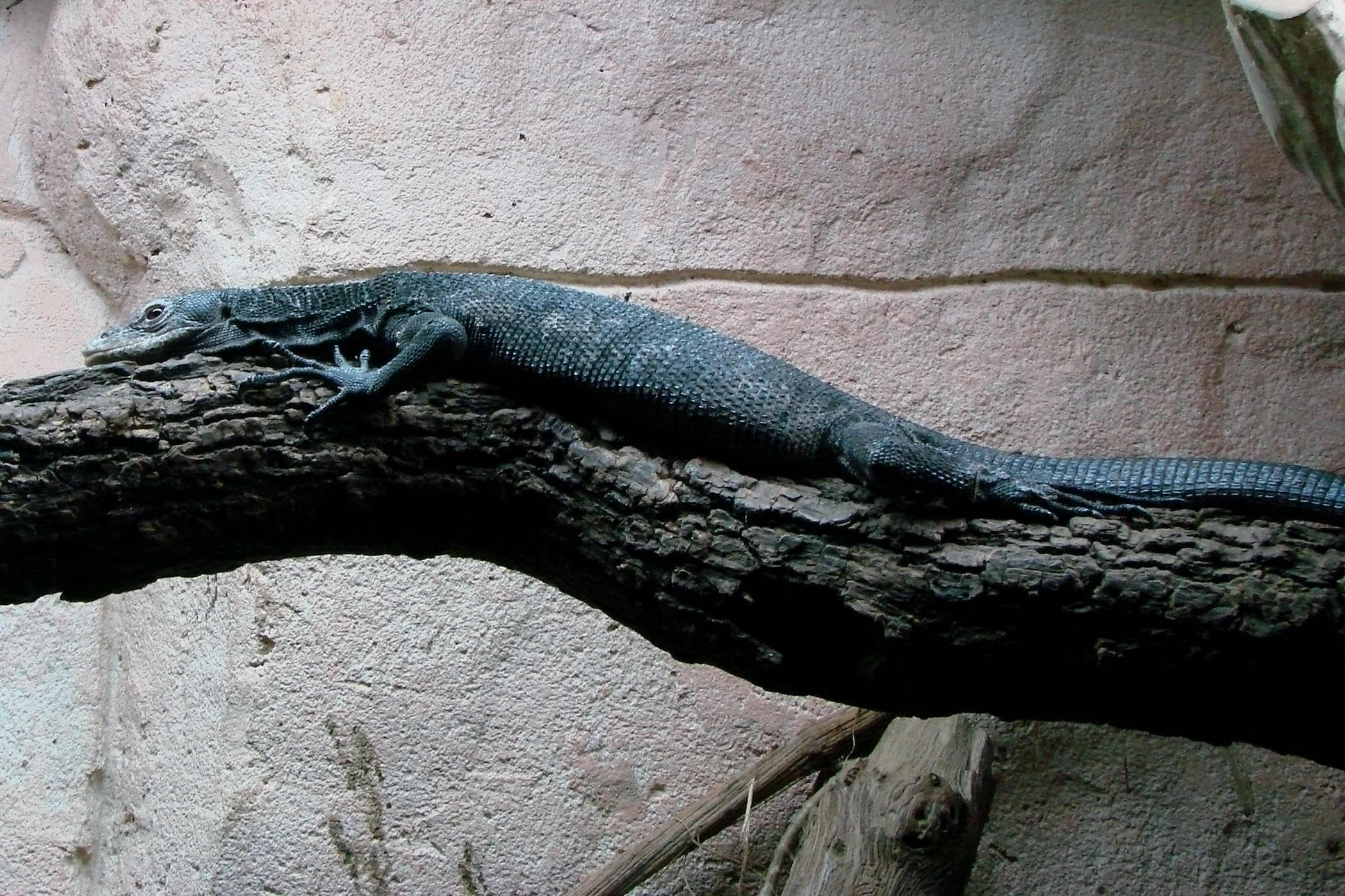 Varan noir de Beccari (Varanus beccarii), zoo d'Amnéville.